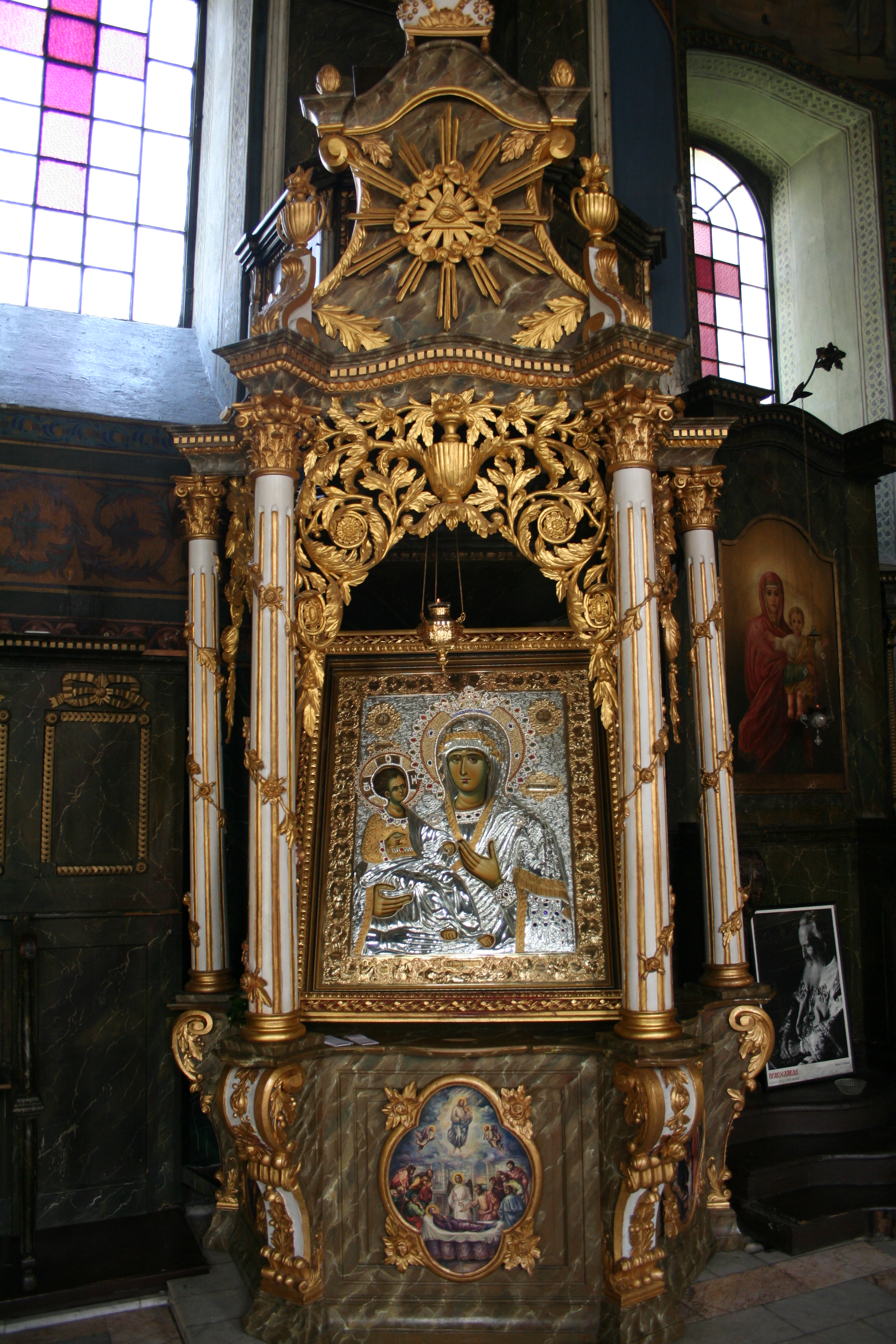 Saborna crkva Sv. Petra i Pavla, Šabac-Ikona Bogorodica Trojeručica